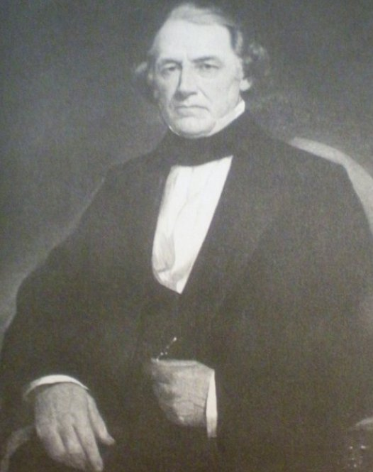 Charles Alston circa 1865